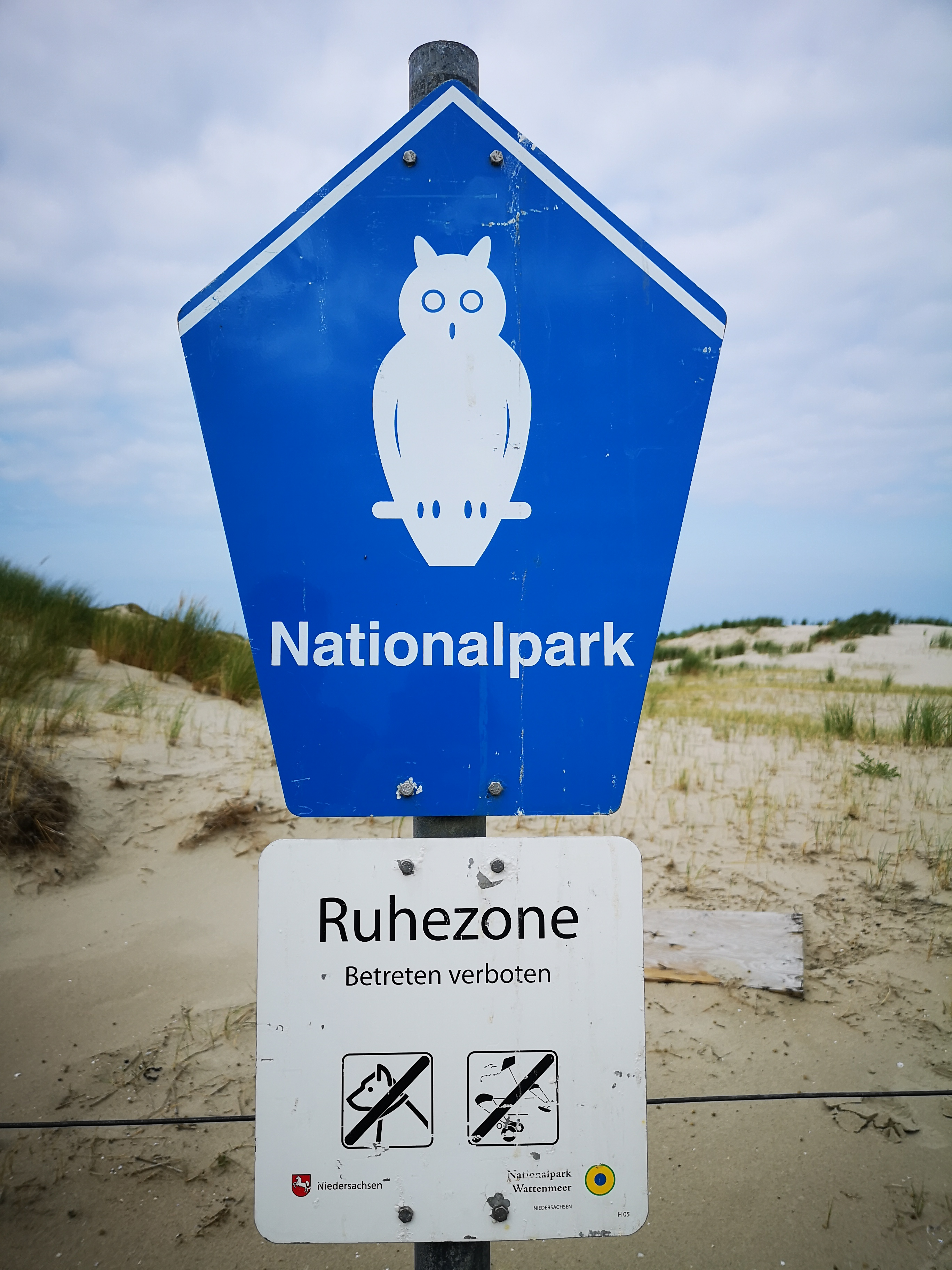 Nationalpark Niedersächsisches Wattenmeer. Schild auf Norderney